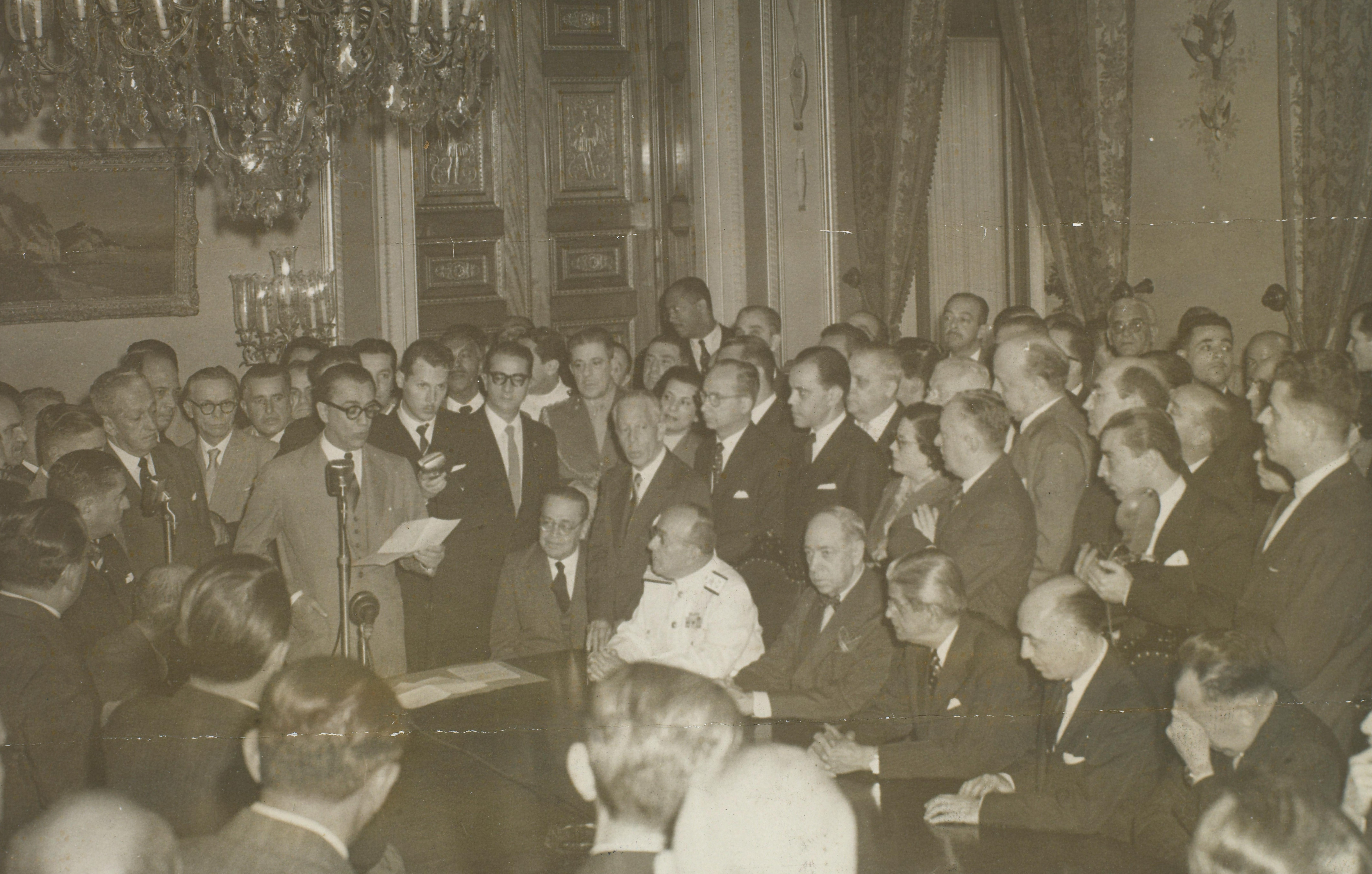 Fotografia do Fundo Correio da Manhã, sob a guarda do Arquivo Nacional.